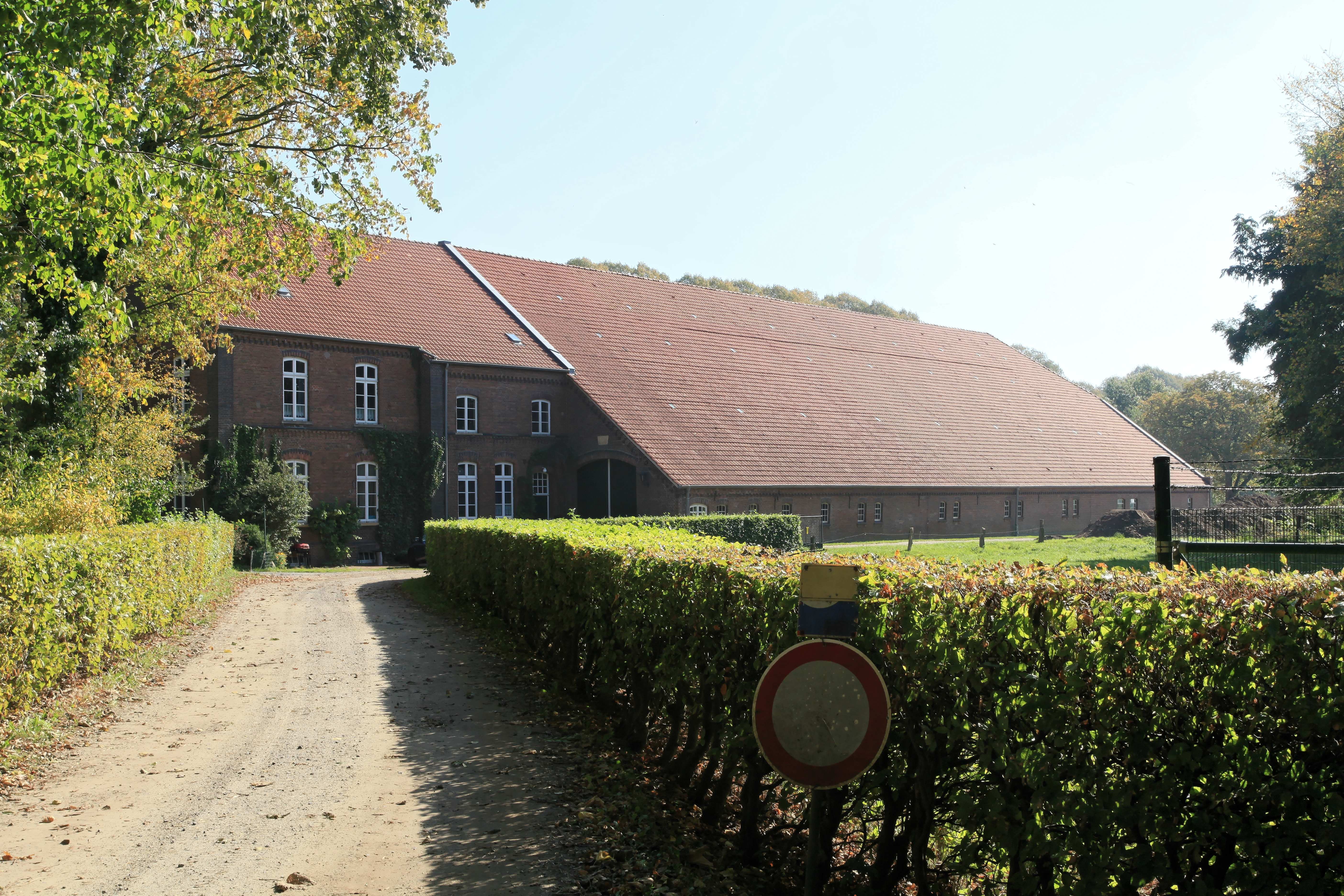 Meierhof der Evenburg, Am Schlosspark 25a in Leer (Ostfriesland)